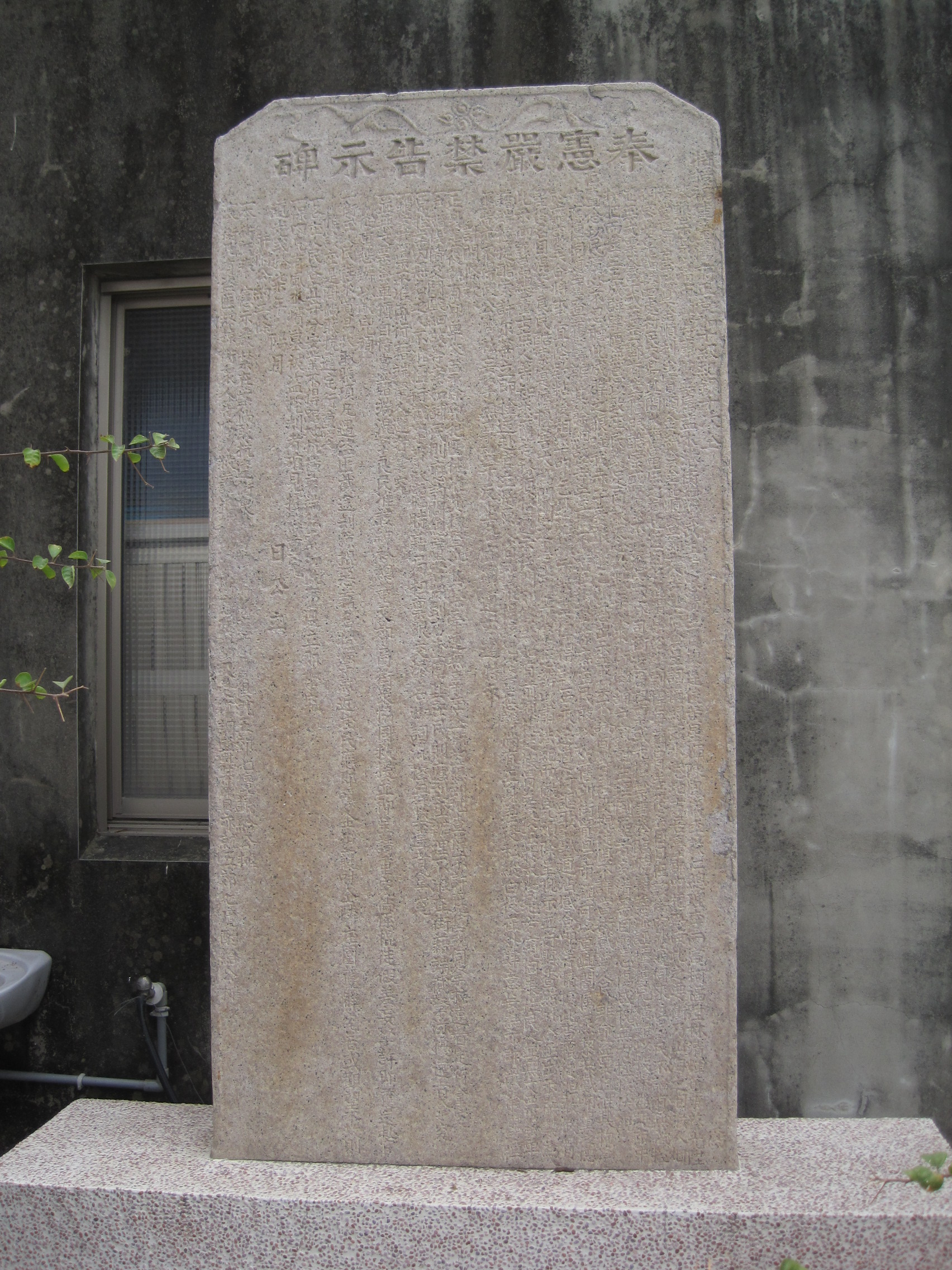 鹽水武廟「嚴禁奸棍藉冒差役酷索碑記」 奉憲嚴禁告示碑 特授福建臺灣府正堂、加十級、紀錄十次仝，為簽懇示禁以靖市鎮等事。 據嘉屬鹽水港街總理武生黃忠清、生員廖廷俊、黃星輝、陳鳳儀、李敦仁、總理李丙寅、柯福陛、林清輝，董事蔡光陛、黃尚達，郊戶李勝興、金順利、金寶順、金綿發、金和順暨舖戶人等，赴府僉呈詞稱：『緣鹽水港地方，居臺郡中樞，為南北之要衝，乃山海之咽喉，人煙稠密，舟車輻輳，四處村民交易其間，久稱富庶之鄉也。近因奸棍蝟集，俗變剽悍，每藉冒差役名目，日在該街內外窺伺來往孱民，不論有無被控，並無文票簽單，或藉莊鄰有案擄跟酷索，或擄索不遜、憑空赴分司衙造局扭稟，或先擄禁、事發臨時藉案添誣：種種威橫，難以枚舉！盤據市中，擇肥而噬，三五成群，肆擾無忌。以致莊民裹足，商旅寒心，故數年以來街衢舖戶寂靜，生理倒罷者多。清等目擊心傷，感愧無力拯救！伏睹憲臺念切民瘼，必不忍聽此成群之狼噬我赤子。爰敢懇乞鴻慈，出示嚴禁：不論何等差役棍徒，俱不許當街截拏人民；雖民盜要犯，准其拘拏，亦應傳同總董查獲籌辦；其餘細故等案，一概不准在街拏掠。庶莊民敢以如舊到街貿易，市鎮可以重興，閤屬蒸黎共戴卵翼之德於靡既矣！合將事宜條款粘後，相率叩乞恩准檄示嚴禁，俾得勒石，永遠遵行，謳歌載道。沾感！僉叩』等情。 據此，查棍徒膽敢假冒差役名目，混拏良民酷索，實屬擾害，大為閭閻之患！亟應嚴拏懲辦，以肅法紀，而儆兇頑。除呈批示並行縣查照外，合亟出示嚴禁。為此，示仰該屬總董士庶人等知悉：爾等務須恪遵示後開列條款，如有前項棍徒假冒差役在於本街地方窺伺來往民人，並無文票簽單；藉端擄酷索，許爾等立即擒送赴官，立將原人省釋，嚴提該犯，從重懲辦。倘有正身差役私縱白役在外肆意妄為，亦即嚴拏解辦；但爾等亦不得假公濟私，妄拏無辜，致干反坐。各宜凜遵，毋違！特示。 計開： 一、正身差役，執有印單簽票，除兇犯匪徒准其拘拏外，其餘牽連無辜莊人，一概均應到地查傳，不許在街窺伺拏掠，違者定行拿究！ 一、戶婚錢債及鬥毆細故等案：如舖民，則應詢問總董耆保，到店查傳；其莊民，即應到莊辦理，不准在街藉端截拏滋擾，違者拿究！ 一、原控案內無名之人，不准擅行截拏、事發臨時藉局扭稟、跟交添名砌詞混控舞弊，違者拿究！ 一、銷案舊票，不准再行藉端拏人，違者拿究！ 一、並無文票僉單，擅自恃黨籍端混拏良民，准該紳衿總督及郊商街眾，協同救援，並即呈請重究；倘係棍徒假差妄拏，許即獲送赴官，從重懲辦，以儆兇頑。 一、街莊人民往來貿易、收取賬項，凡遇盜匪截途劫掠，棍惡藉名搶拏，就近莊民應即鳴金出護，協同鄰莊圍獲解究；若或觀望不救，則惟該莊是問；倘敢抗違，定行重究！ 一、各莊人民各宜守分安業，不得踞地抗橫，藉端私索；如敢不遵，立即拏究！ 一、保內凡有風水墳墓被盜挖劫者，確見擄（拏）解重究！ 道光二十七年陽月（缺）日公立。 附公約二條 一、本街既奉憲示嚴禁在案，倘敢抗違，街眾協力拏解，所應開費，俱就五郊、七境議給公攤。 一、本街凡有盜匪劫掠，街眾人等協力救護，追擒盜賊，所應獎賞及受傷調醫等費，亦就五郊、七境酌給公攤。